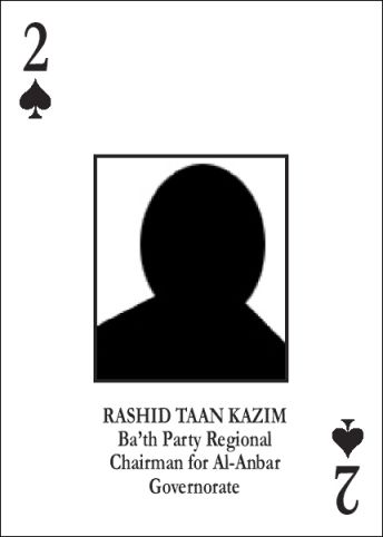 Рашид Таан Казим на карте